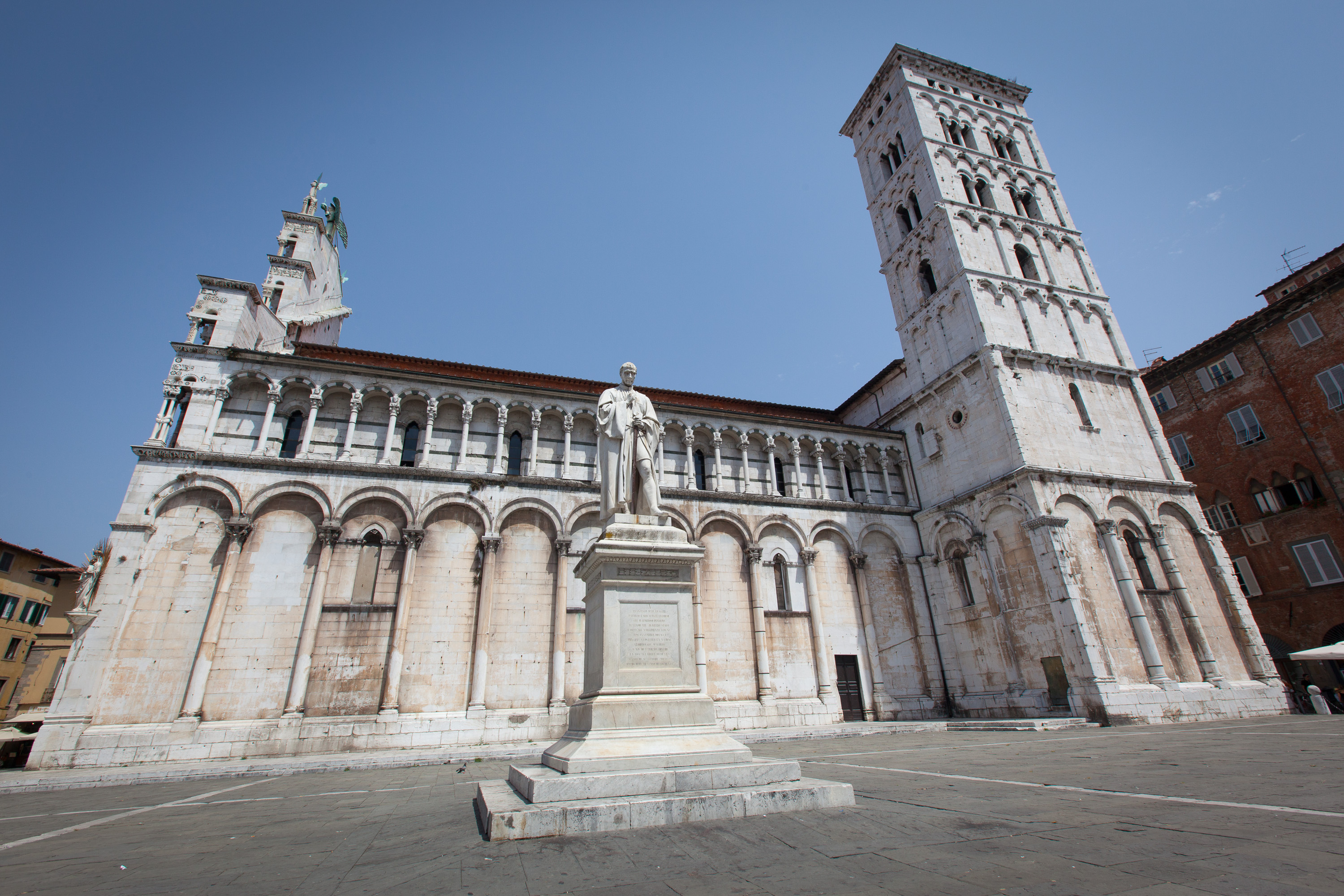 Lucca